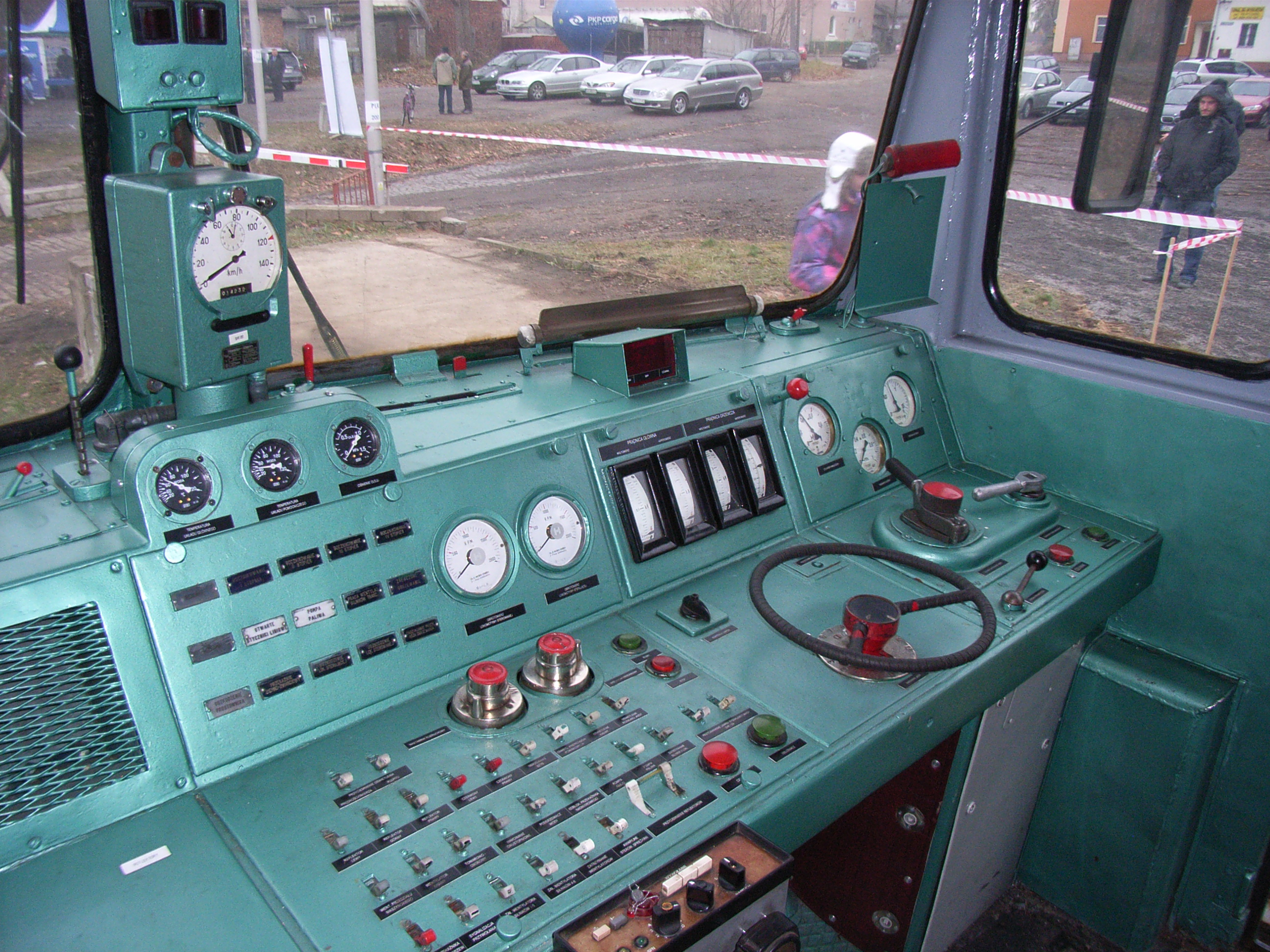 Führerstand einer SU46 der PKP-Cargo